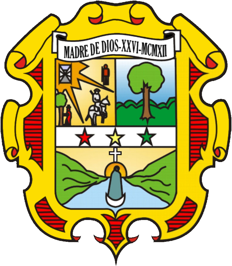 Escudo de Madre de Dios